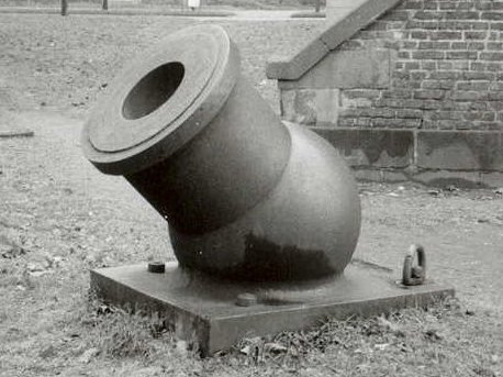 Ein Festungsmörser in der Zitadelle Wesel. Das Geschütz mit dem Kaliber 32.5 cm wiegt 5 t und wurde 1812 in Lüttich gegossen. Die Schußweite betrug 4'000m bei einer Pulverladung von 7 kg. Das Rohr ist 110 cm lang.